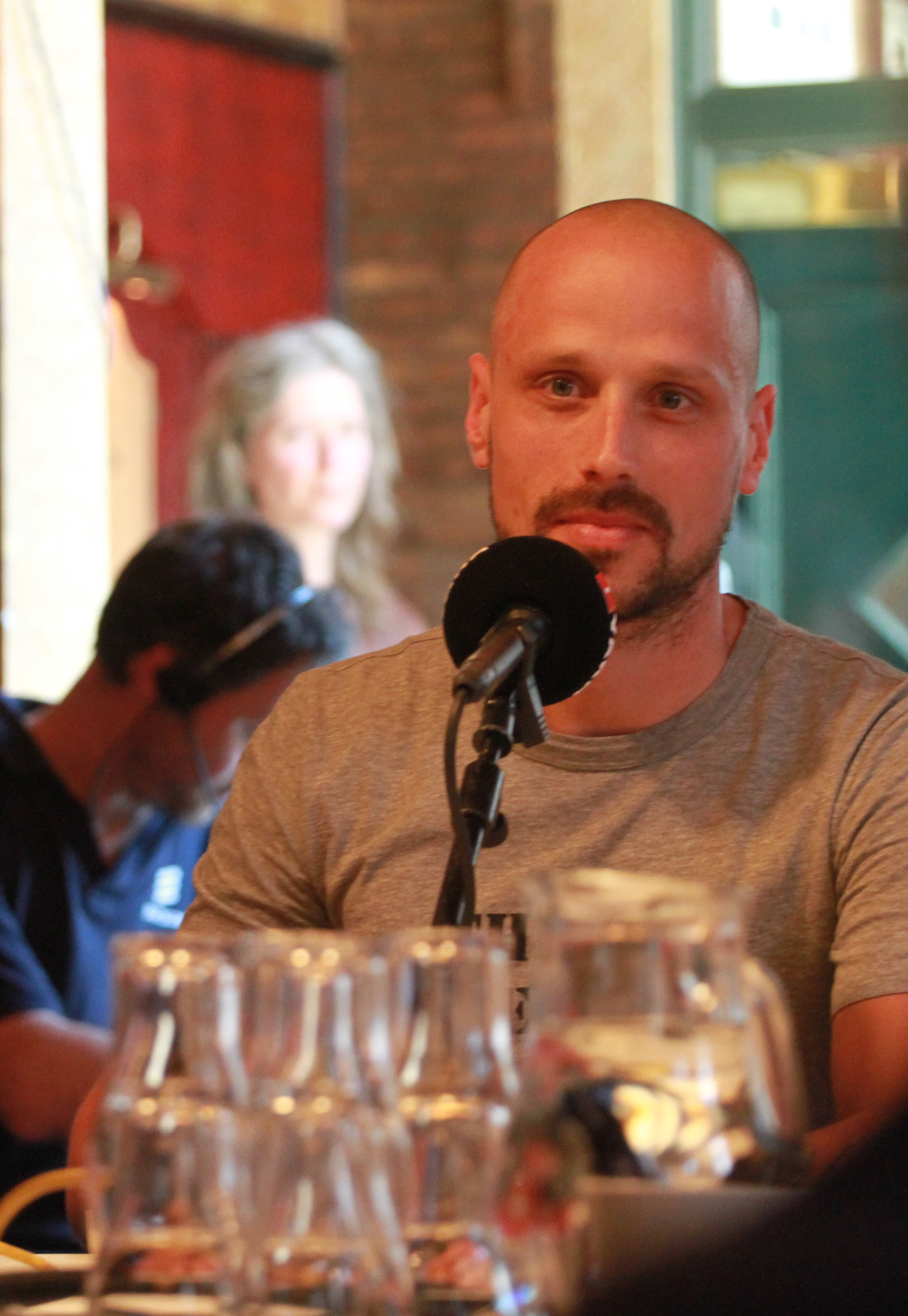 Jop de Vrieze bij uitzending Spijkers met Koppen